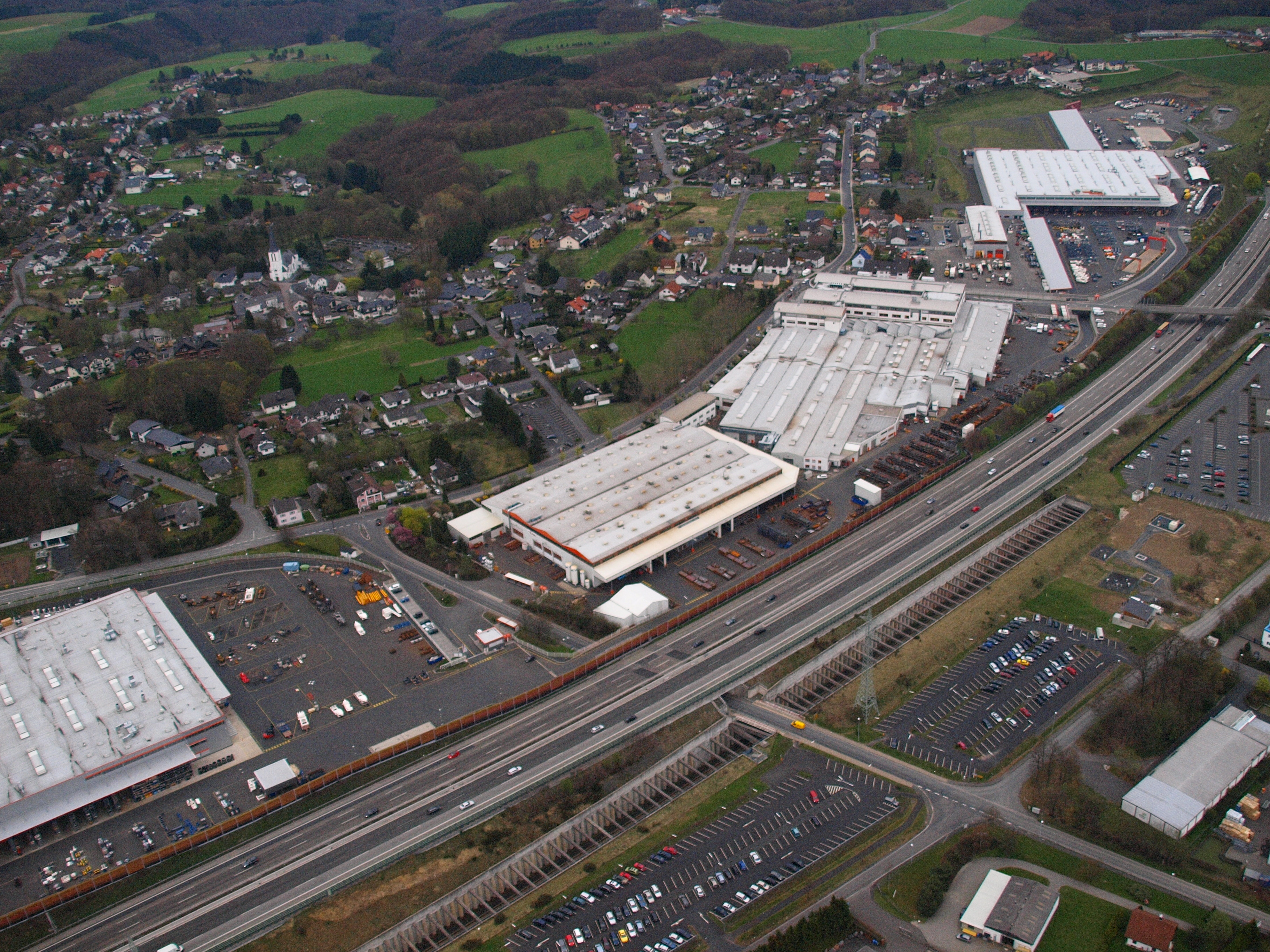 Firma Wirtgen an der Bundesautobahn 3, Windhagen: Luftaufnahme